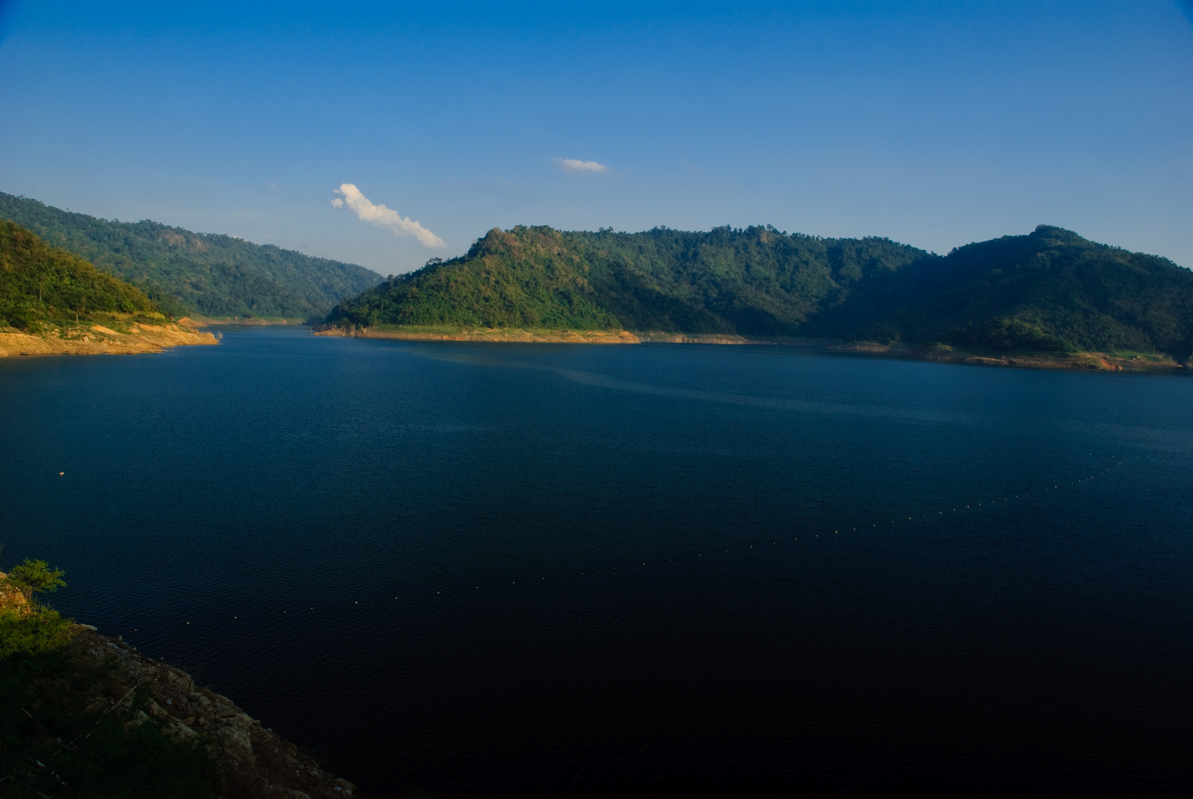 ทัศนียภาพบริเวณอ่างเก็บน้ำของเขื่อนขุนด่านปราการชล